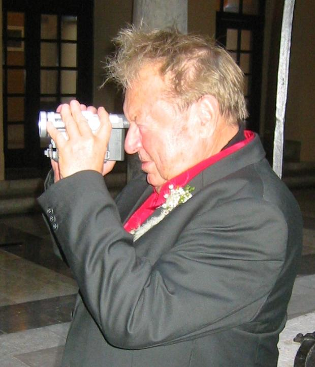 Boštjan Hladnik, slovenian film director photo:Ziga 12:40, 30 May 2006 (UTC)